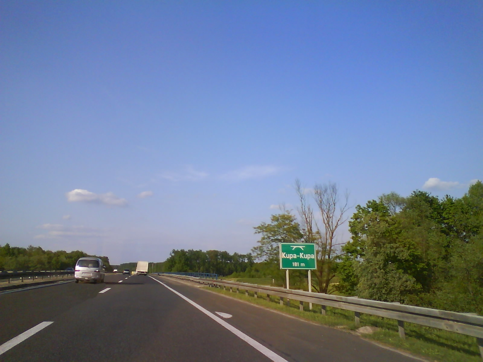 Vijadukt Kupa